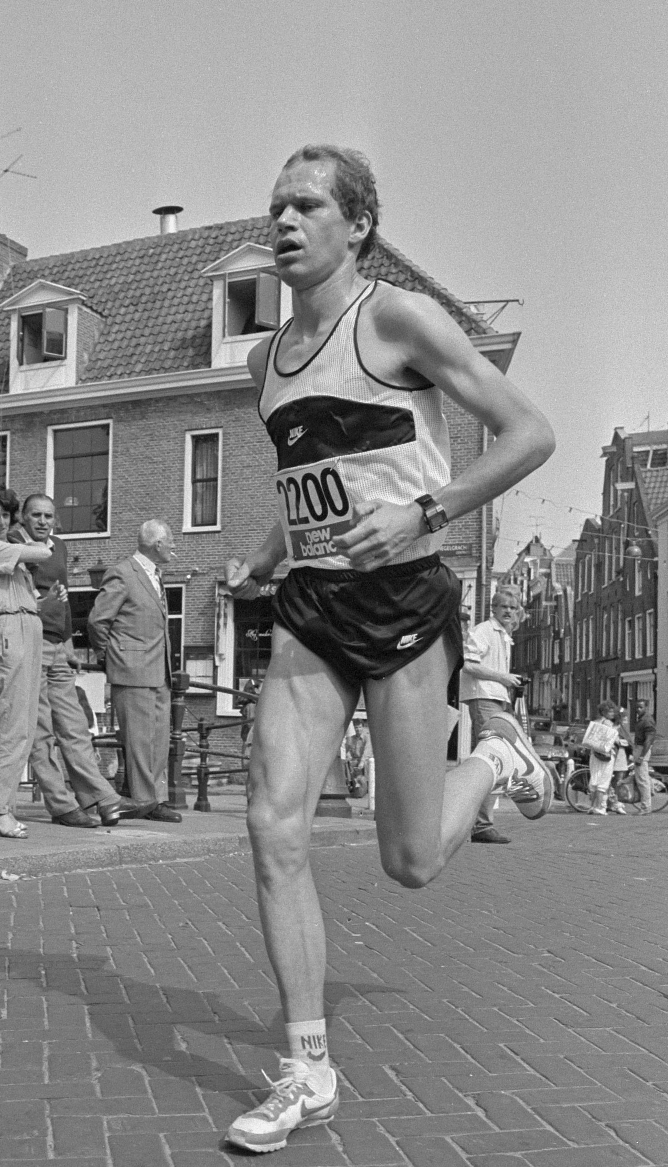 Grachtenloop Amsterdam; Cor Lambregts in actie.